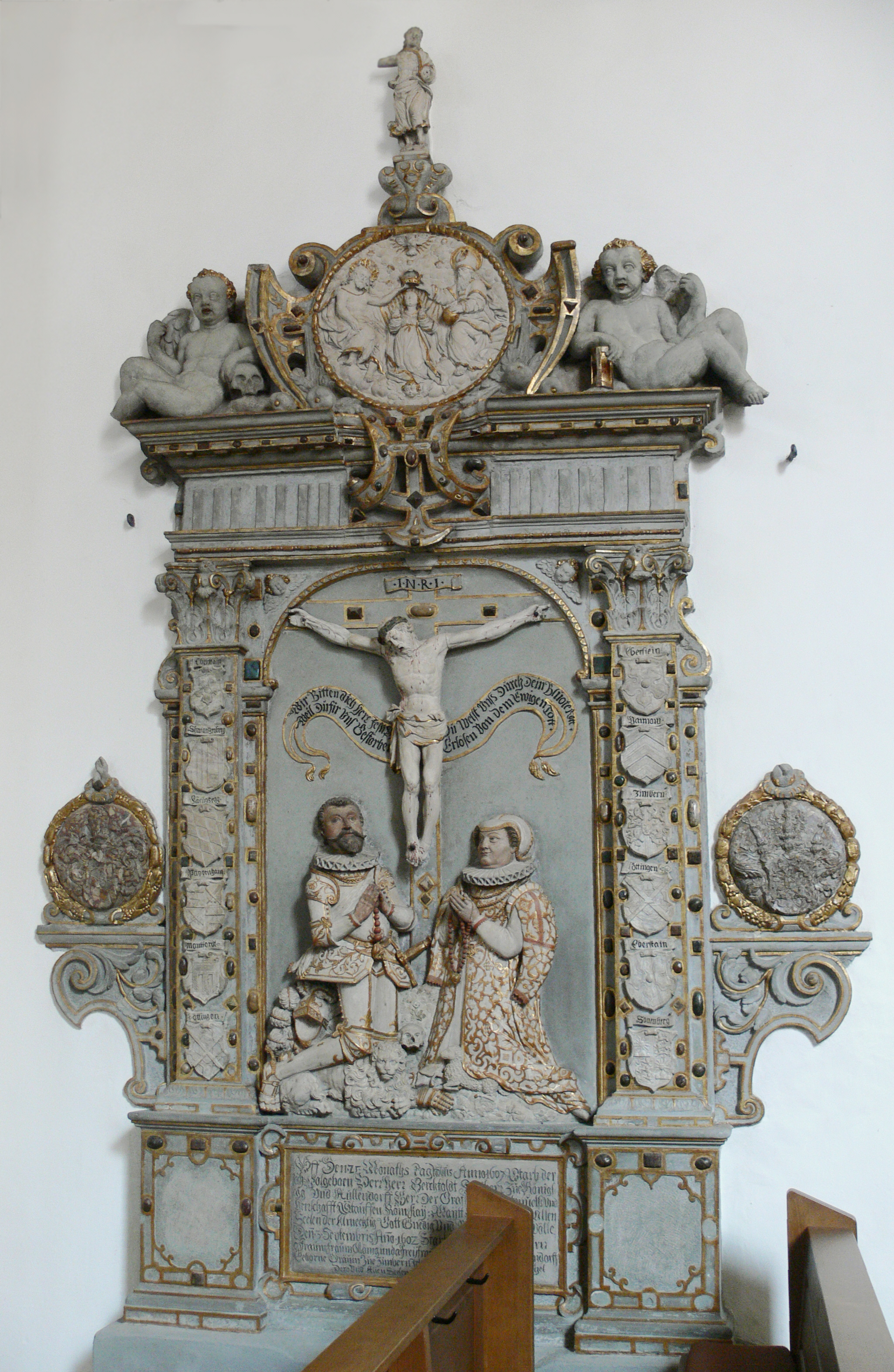 Pfarrkirche St. Martin, Aulendorf, Landkreis Ravensburg Sebastianskapelle (Gruftkapelle der Grafen von Königsegg) Epitaph des Grafen Berchthold von Königsegg († 1607) und seiner Frau Kunigunde von Zimmern († 1602)